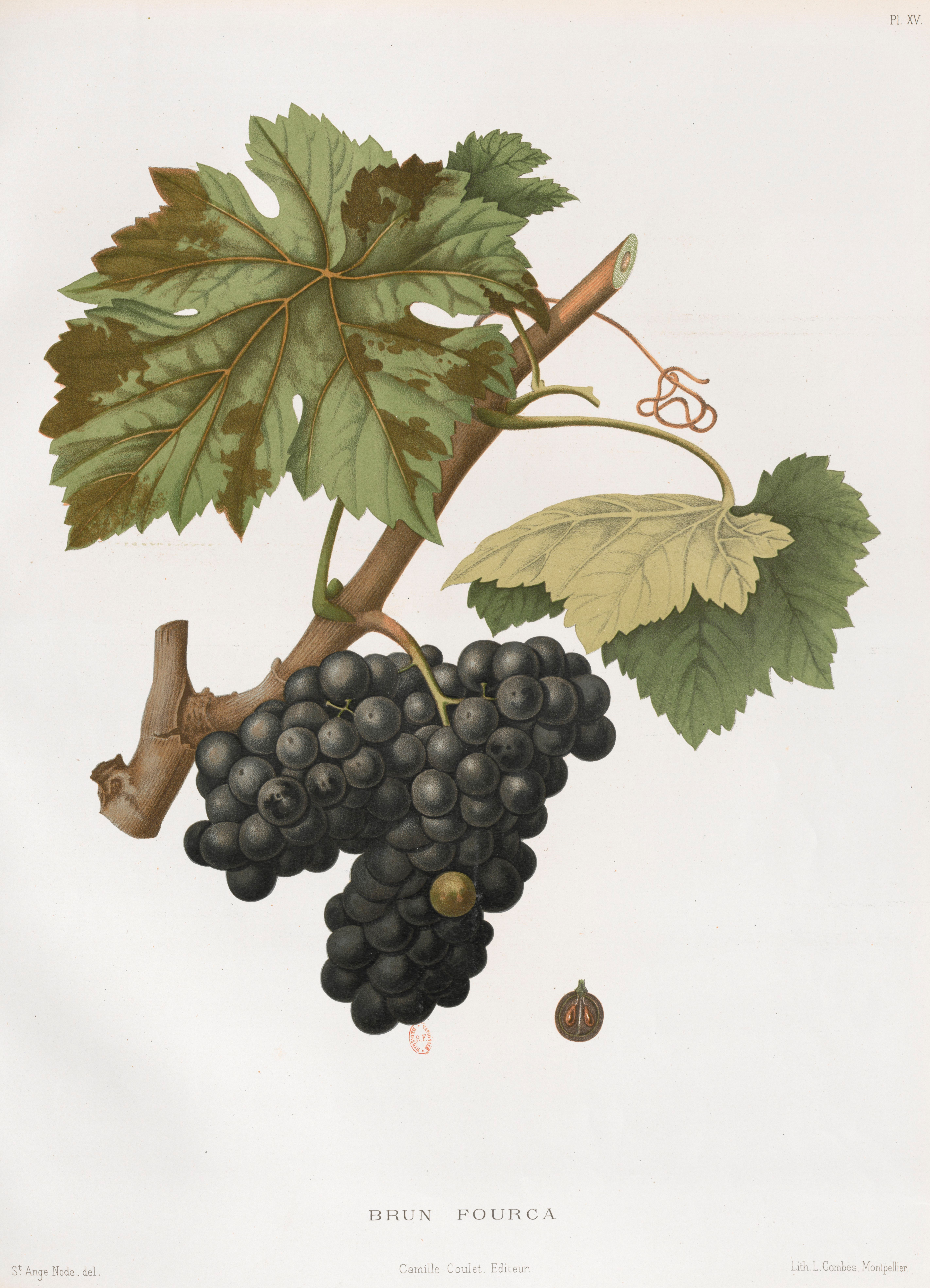 Lithographie du cépage Brun Fourca